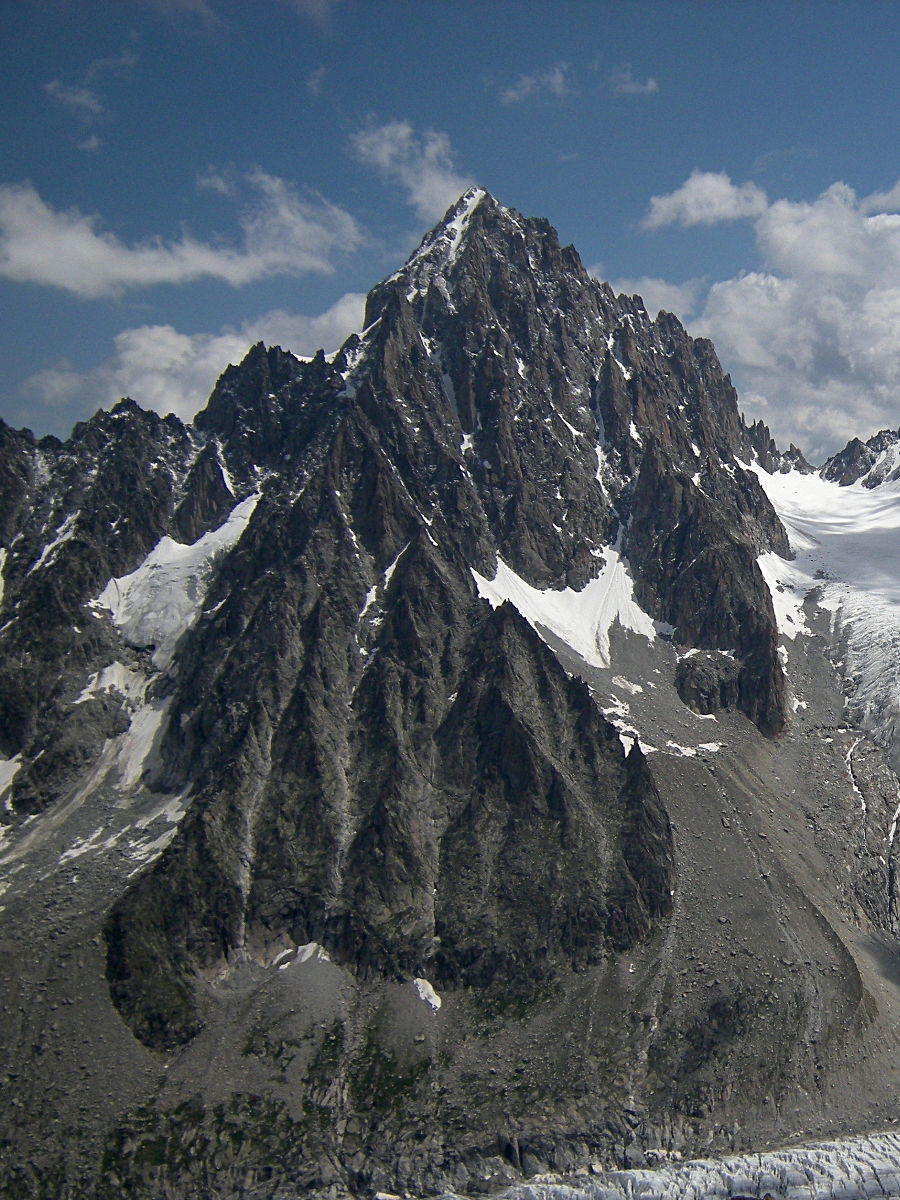 Aiguille du Chardonnet (versant sud-ouest) depuis les Grands Montets